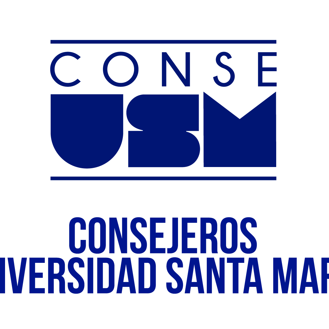 conseusm